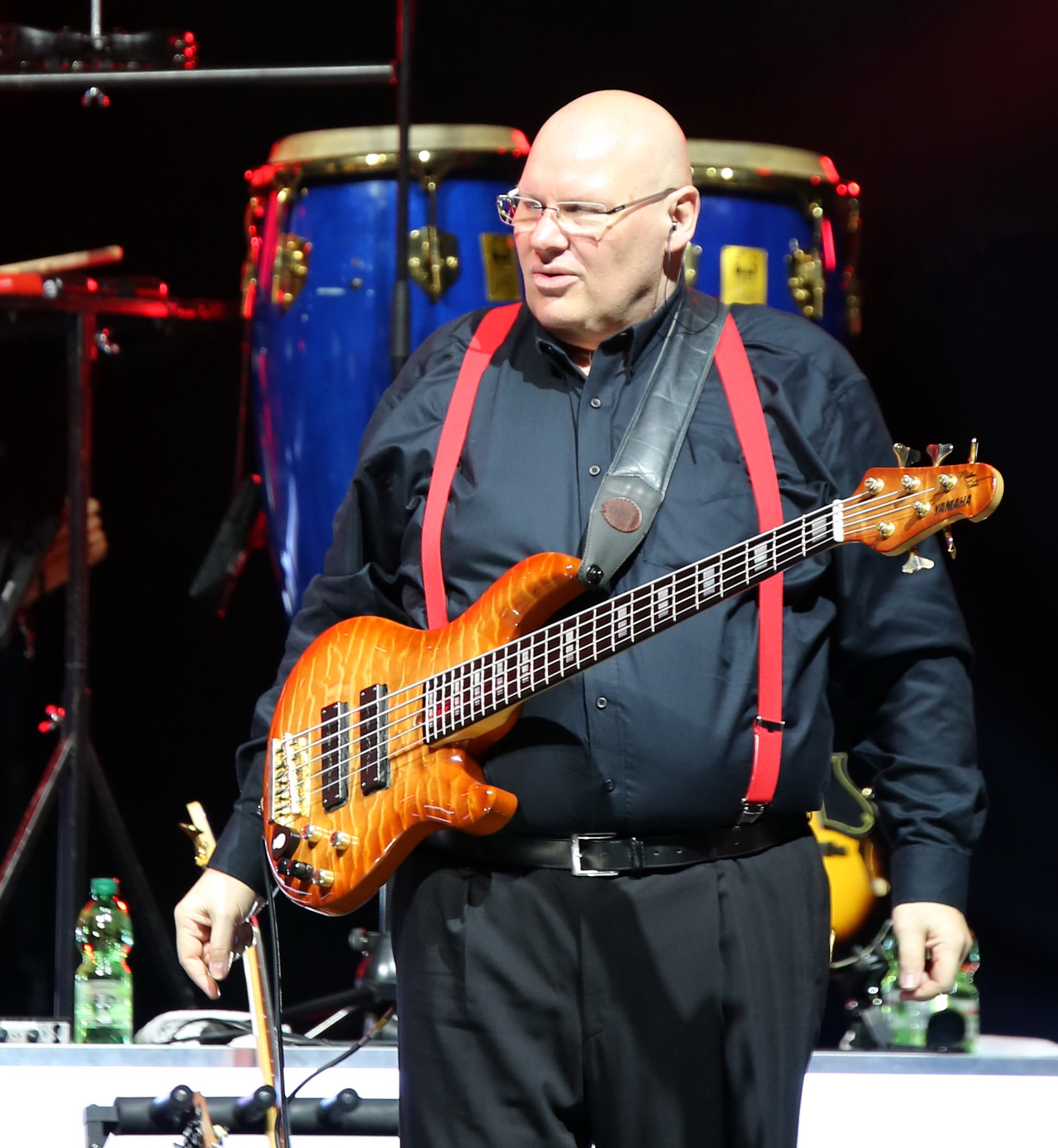 Bassist Frank Itt auf dem Konzert von Howard Carpendale in der BigBOX Allgäu am 26. Februar 2016 Festivalsommer This photo was created with the support of donations to Wikimedia Deutschland in the context of the CPB project "Festival Summer". This file is made available under the Creative Commons CC0 1.0 Universal Public Domain Dedication. The person who associated a work with this deed has dedicated the work to the public domain by waiving all of their rights to the work worldwide under copyright law, including all related and neighboring rights, to the extent allowed by law. You can copy, modify, distribute and perform the work, even for commercial purposes, all without asking permission. Thomas Springer Personality rights warningAlthough this work is freely licensed or in the public domain, the person(s) shown may have rights that legally restrict certain re-uses unless those depicted consent to such uses. In these cases, a model release or other evidence of consent could protect you from infringement claims.